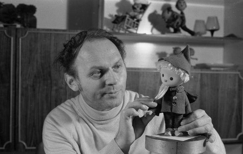 Berlin, Sandmännchen ADN-ZB/Senft/9.11.79/Berlin: Zum 20. Geburtstag des Sandmännchens/ Gerhard Behrendt, der künstlerische Leiter des Fernseh-Trickfilmstudios, ist der "Vater" des Sandmännchens. Wie alle Väter ist er sehr stolz auf sein Kind, das am 22.11.79 schon zwanzig Jahre alt wird und doch ewig jung bleibt. Das Sandmännchen hat auch einige Wachstumsstadien durchlaufen, ehe es so aussah wie heute: 22 cm groß, lustige schwarze Knopfaugen, grüne Joppe mit Cape und Zipfelmütze, braune Kordhose, hellgraue Lederstiefelchen. Abgebildete Personen: Behrend, Gerhard: Künstlerischer Leiter der Puppentrickfilmstudios beim Fernsehen, DDR